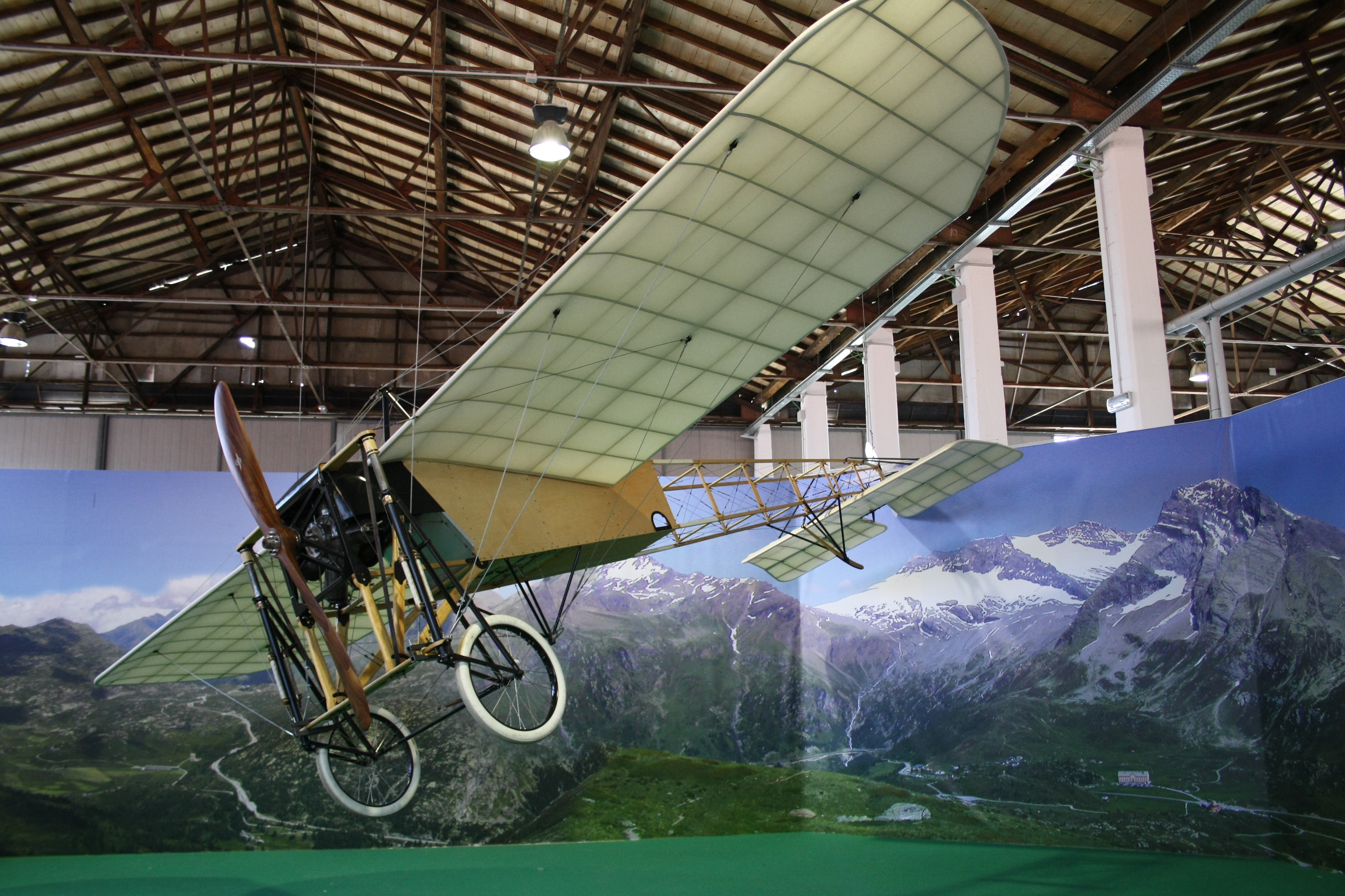 Blériot XI conservato presso il museo del volo "Volandia".